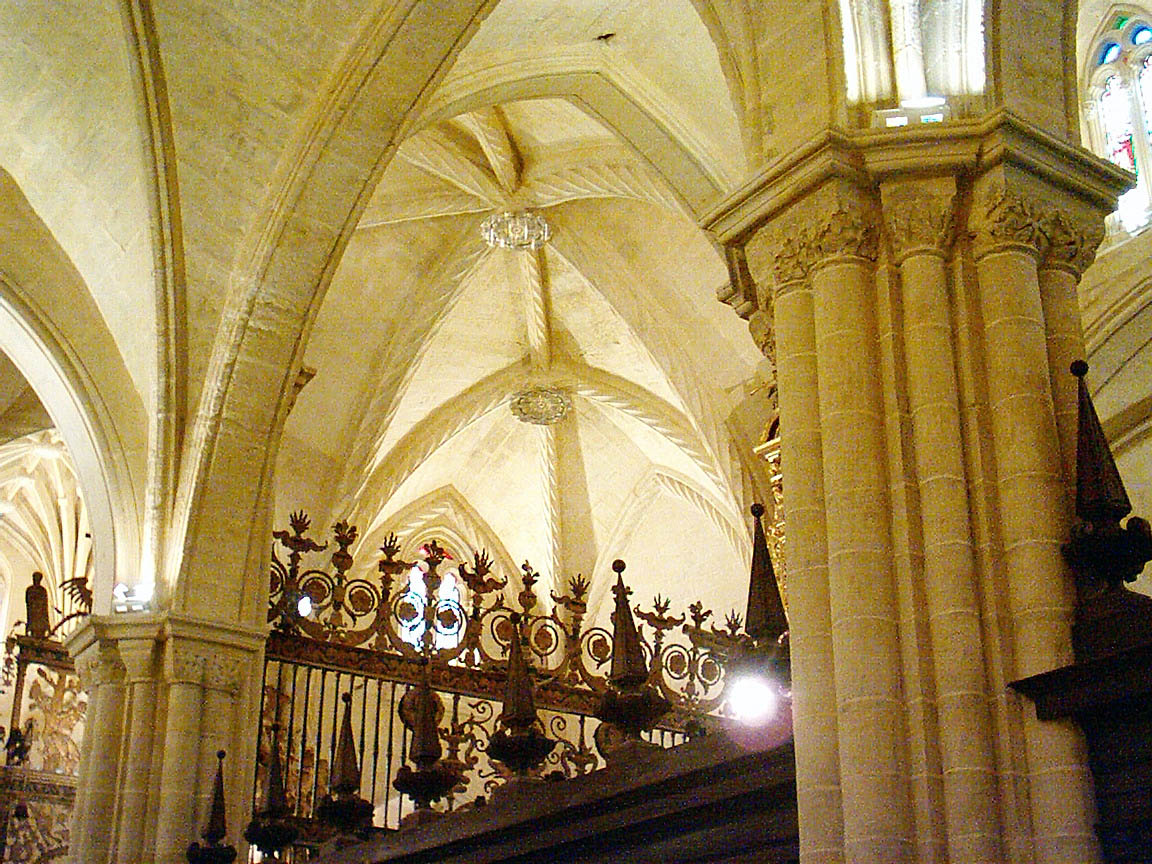 Catedral de Orihuela